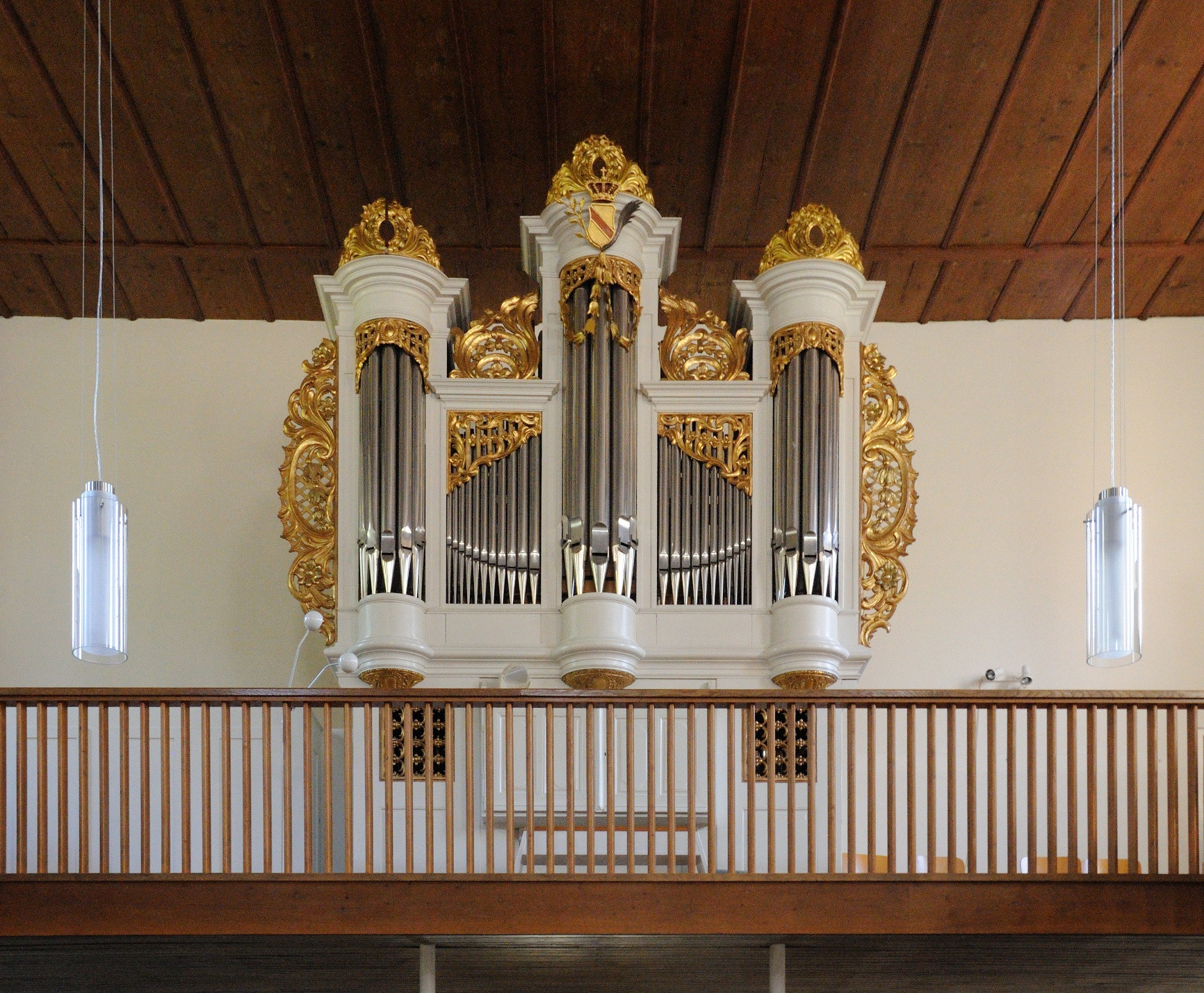 Wies: Orgel der Evangelischen Kirche Wies